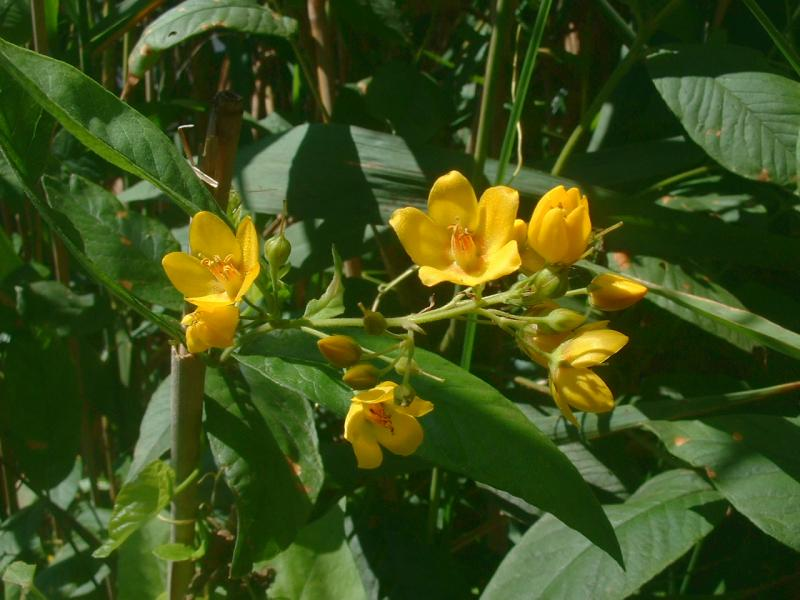 Lysimaque commune, Frasne-le-Château.